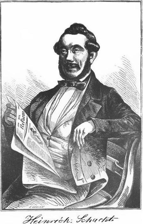 Heinrich Schacht (* 23. Juni 1817 in Hamburg; † 13. Juli 1863 ebenda), deutscher Schriftsteller